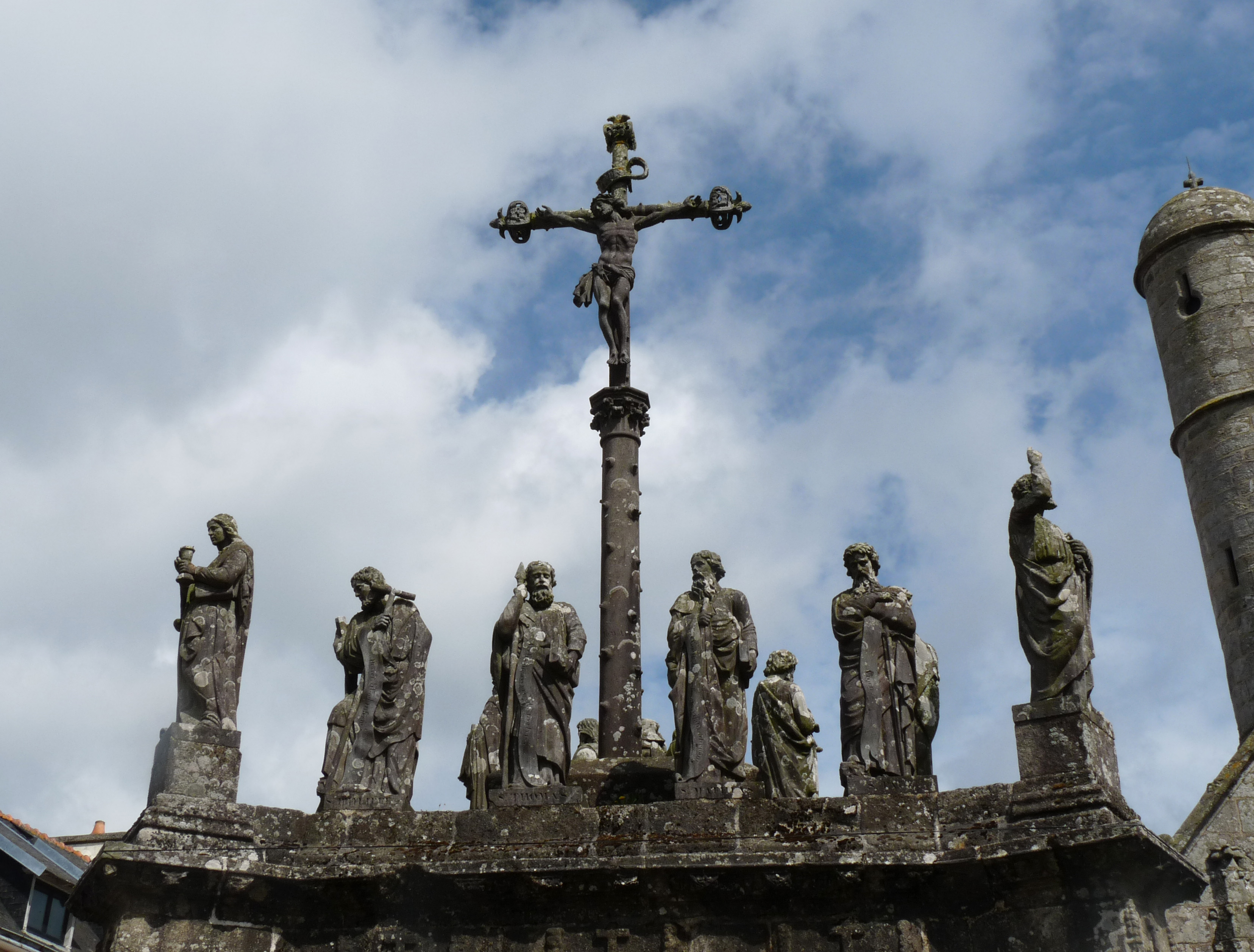 Calvaire (détail) (Confort-Meilars, Finistère, Bretagne)